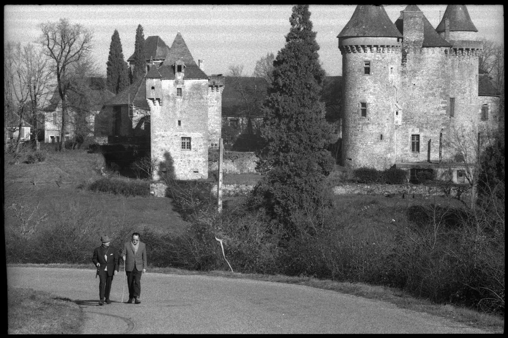 Département du Lot. 6 Janvier 1970. Vue de Maurice Faure et d'Irénée Lacombe marchant sur une route lotoise.